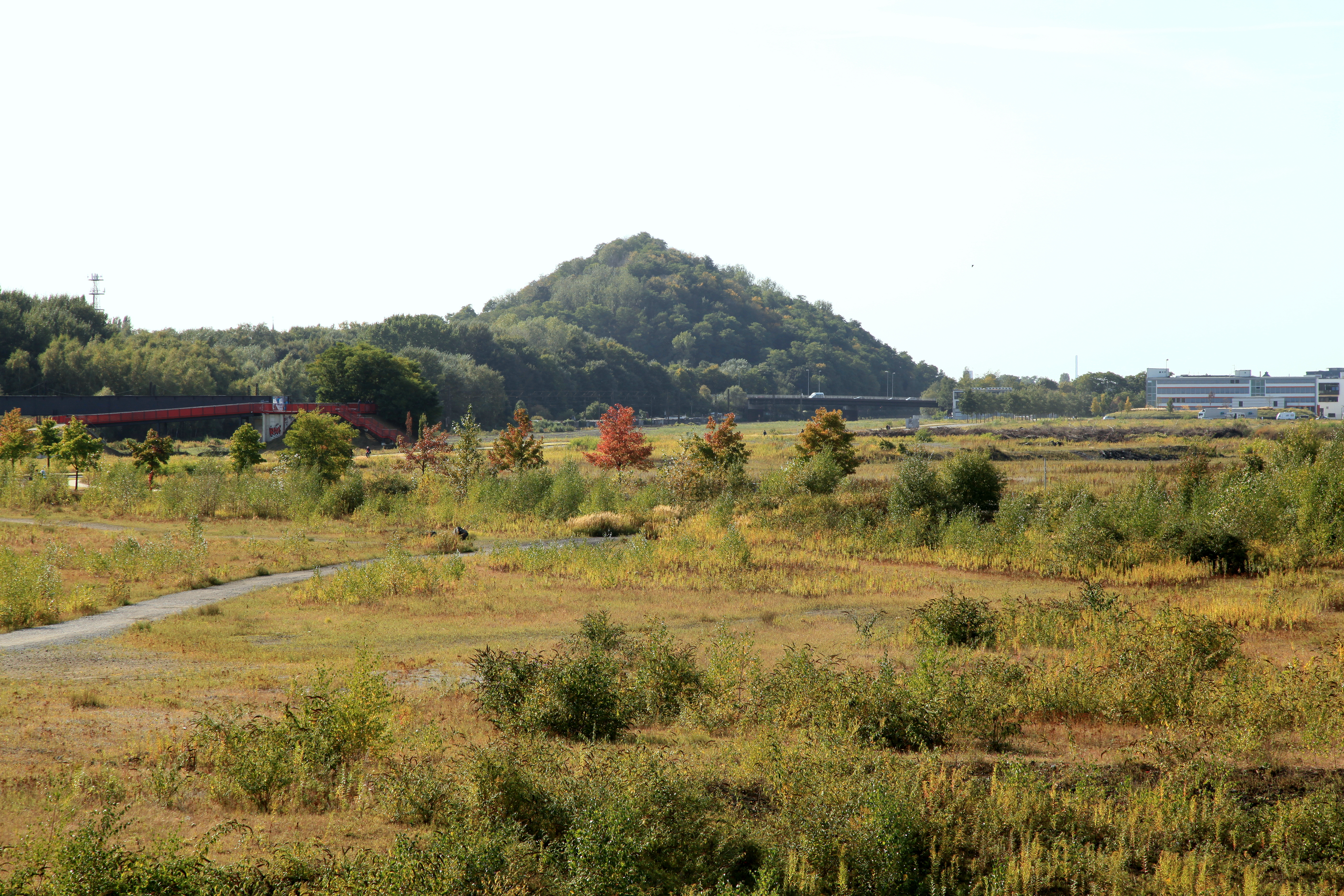 Blick von der Ripshorster Straße zur Knappenhalde in Oberhausen